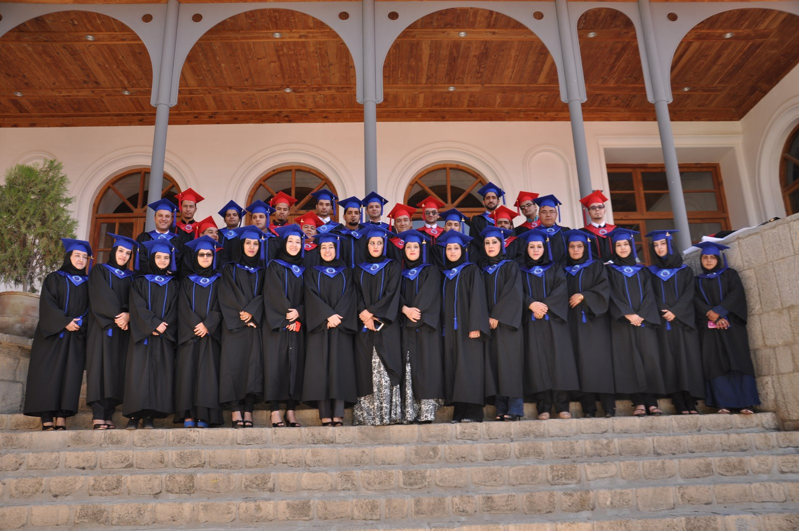 دومین دور فارغان فاکولته طب معالجوی دانشگاه طبی و شفاخانه چراغ